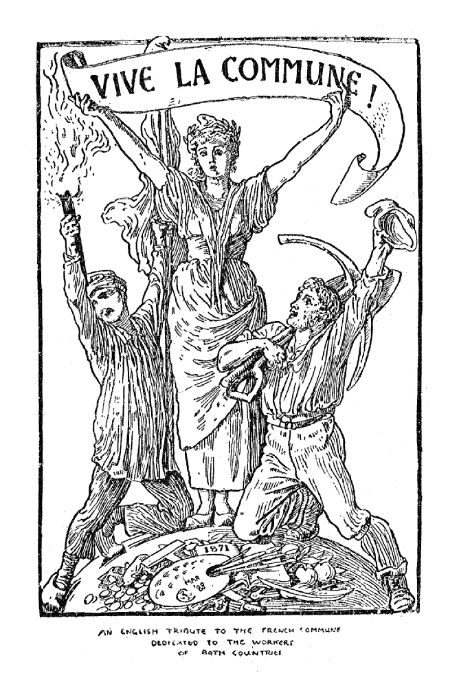 Pottier - Chants révolutionnaires, p. 166.